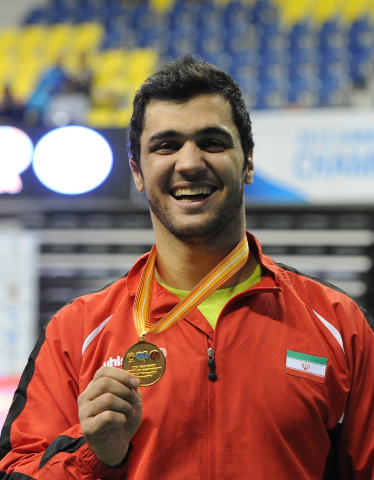 داود گیل نیرنگ مسابقات آسیایی